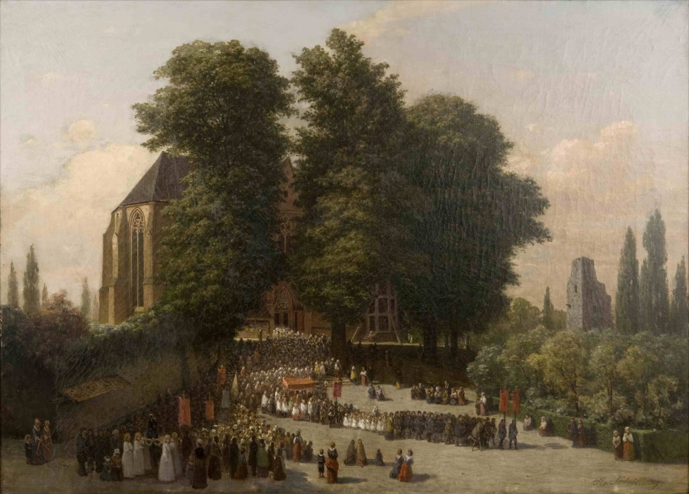 Die Fronleichnamsprozession verlässt die Stromberger Kreuzkirche; Öl auf Leinwand, 56,0 x 77,5 cm; Museum Abtei Liesborn